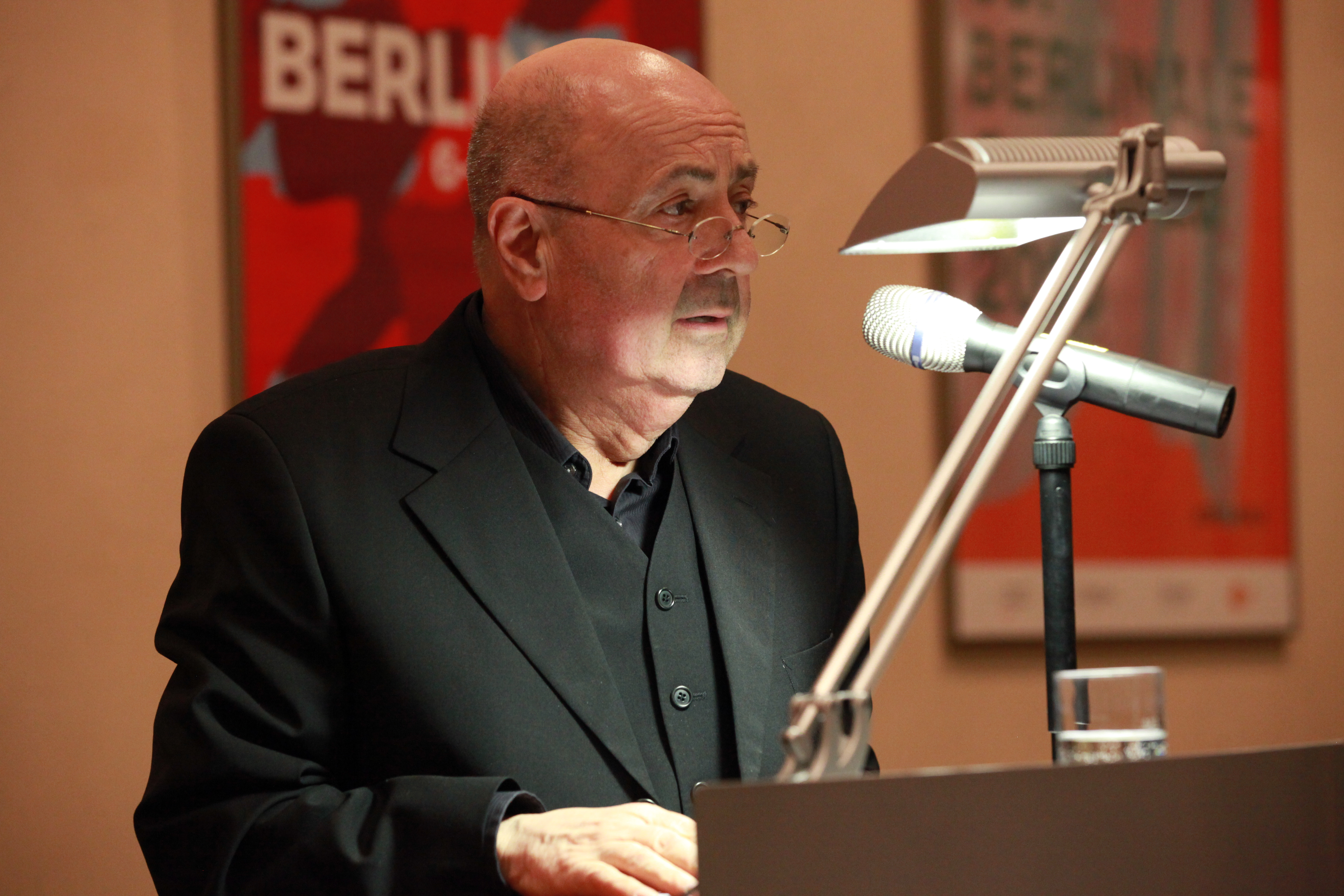 Gerd Wameling liest aus einer Auswahl von Varian Frys überlieferten Briefen